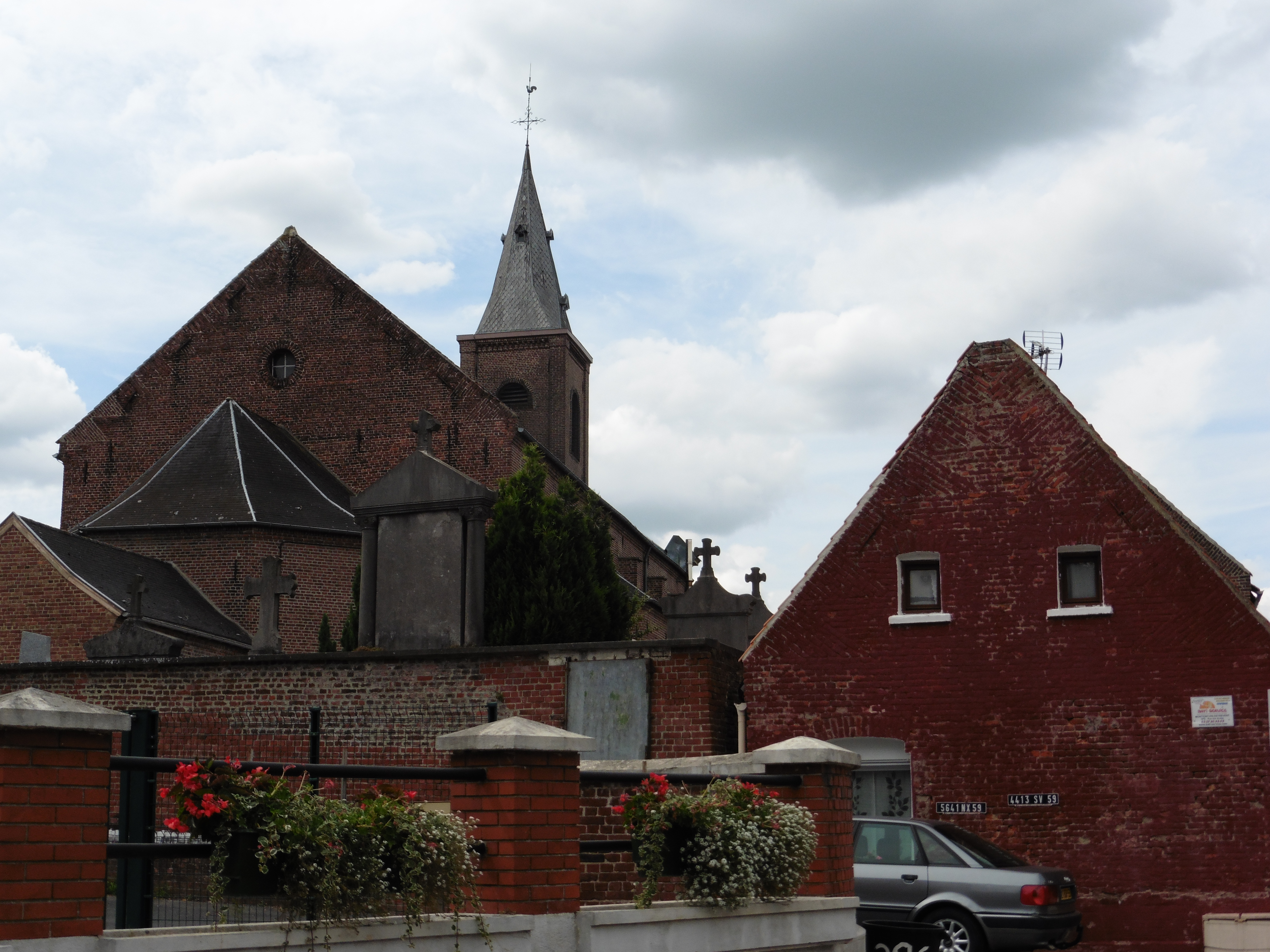 Chevet de l'église Saint-Nicolas Montigny-en-Ostrevent Nord.- France.